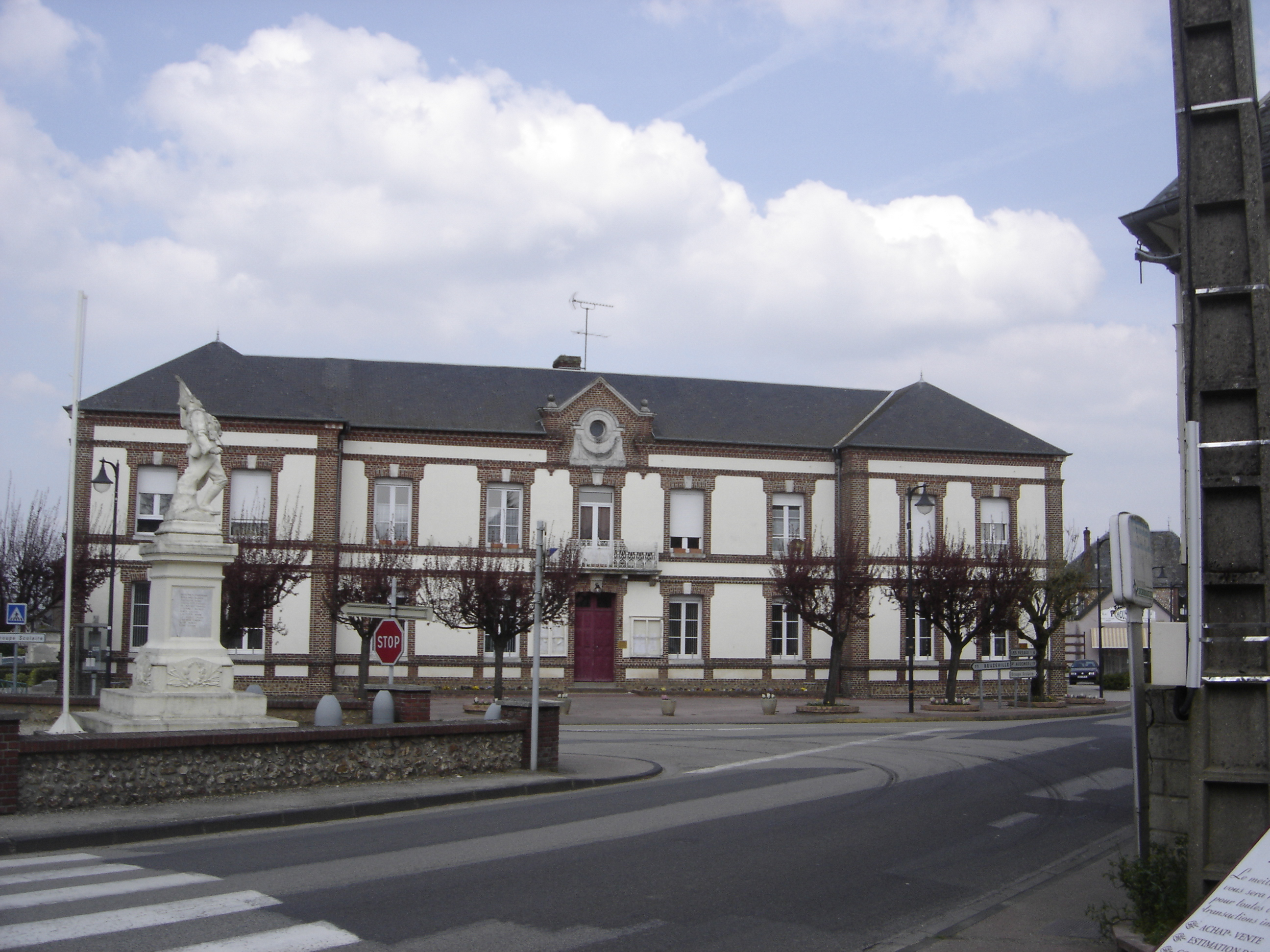 Mairie d'Epaignes - Eure - France